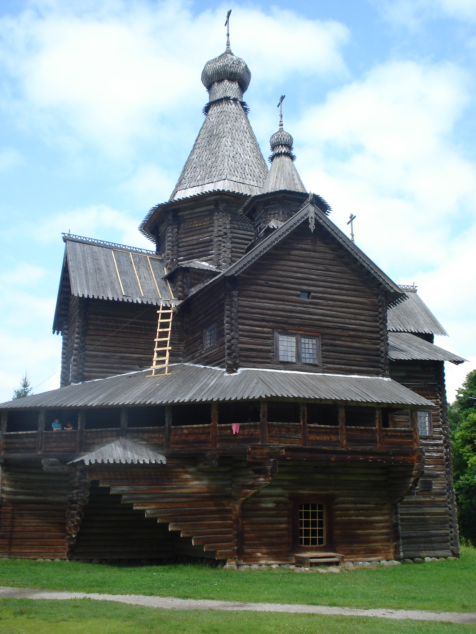 Велики Новгород. Музеј народне архитектуре у дрвету. 5. август 2009.Снимио: Јакша П.